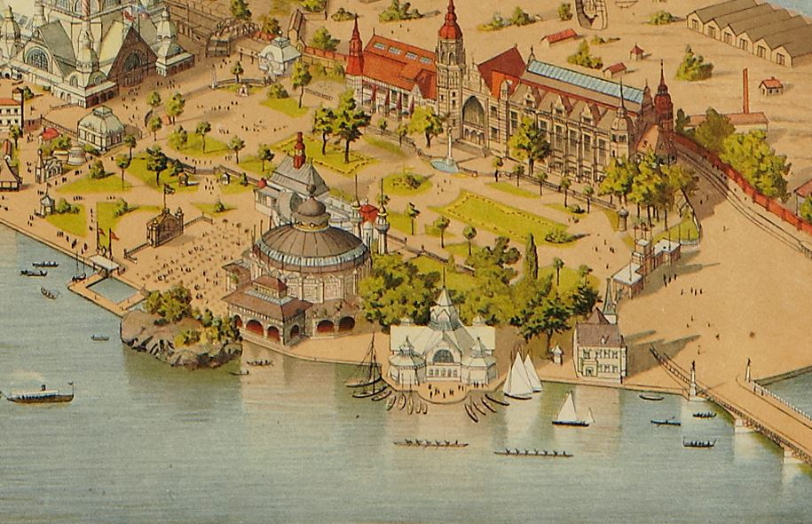 Kaptensudden med Rundmålningsbyggnaden under Stockholmsutställningen 1887